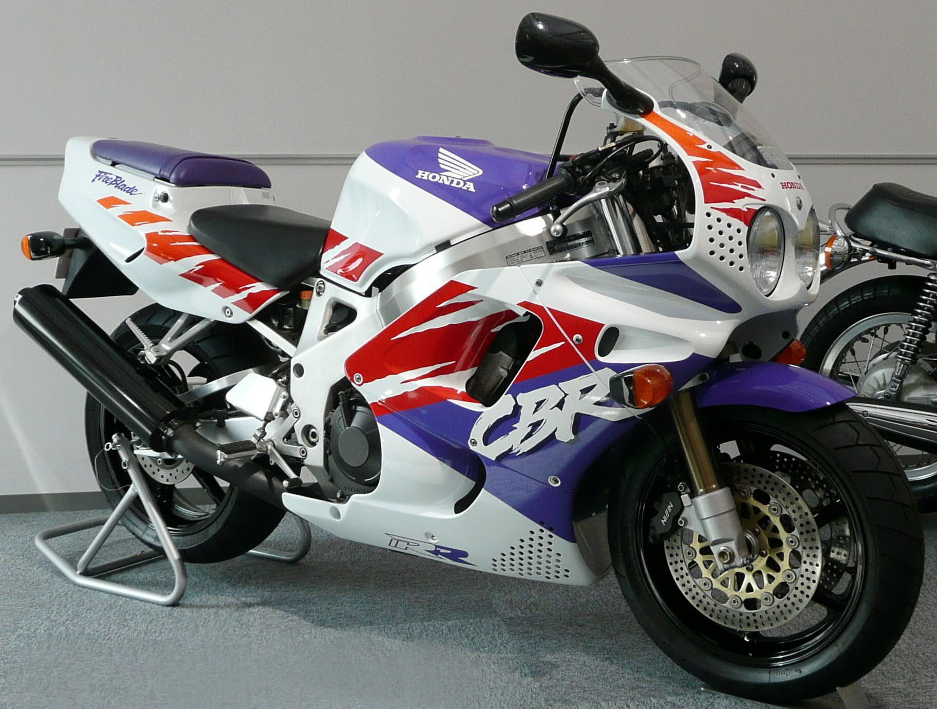 1992 Honda Fireblade